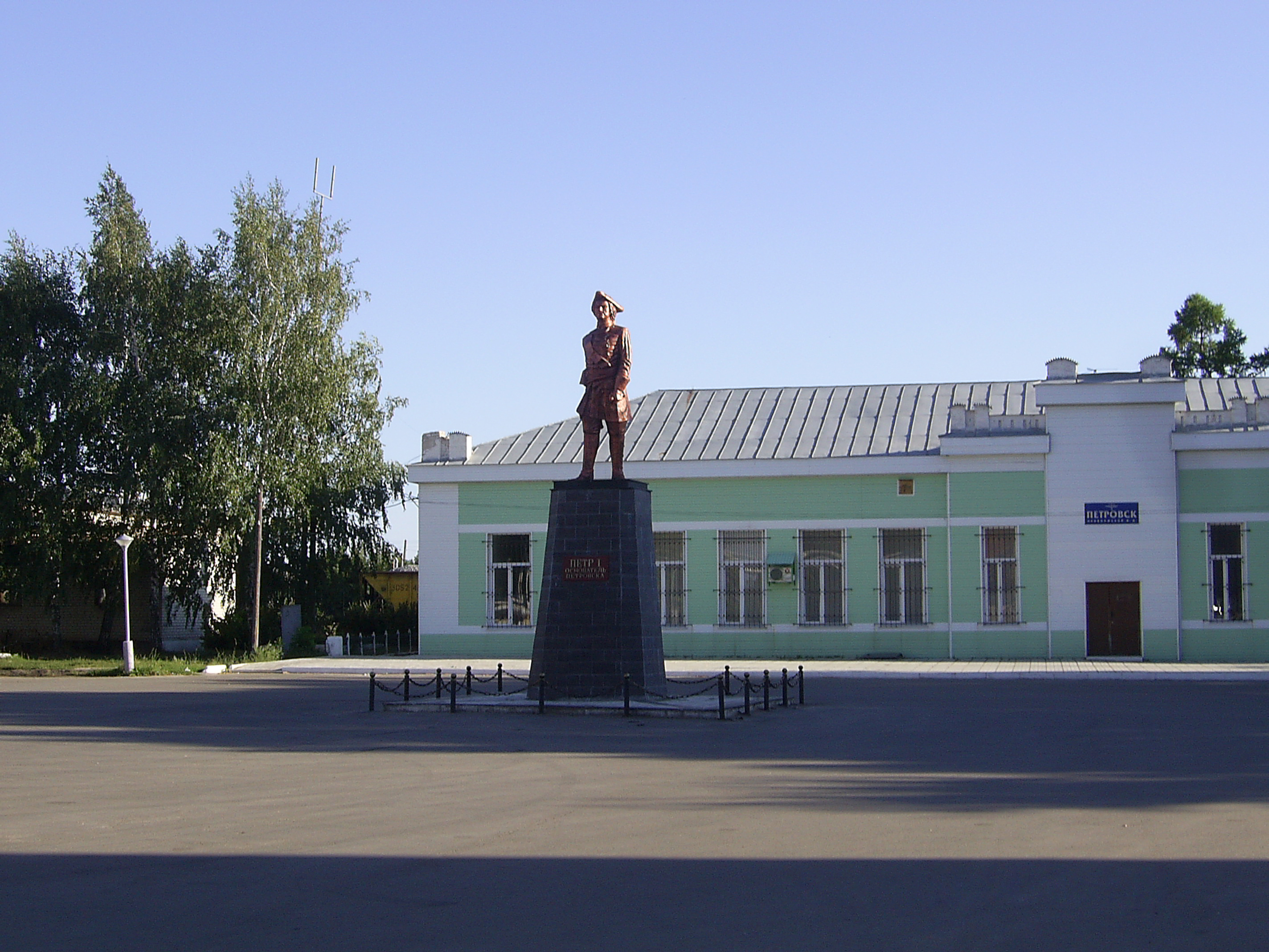 Petrovsk, Saratovskaya oblast', Russia